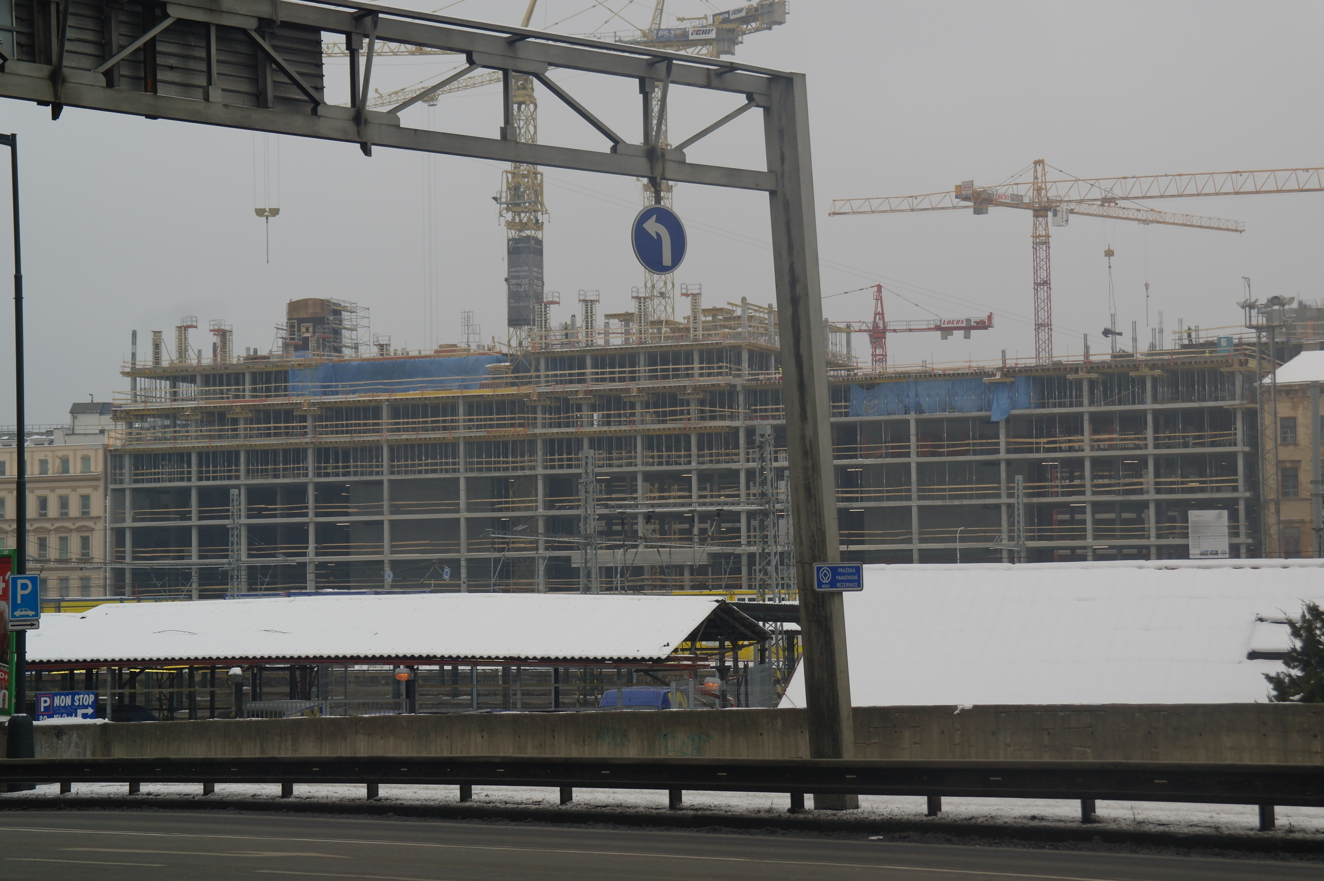 Výstavba budovy Florentinum